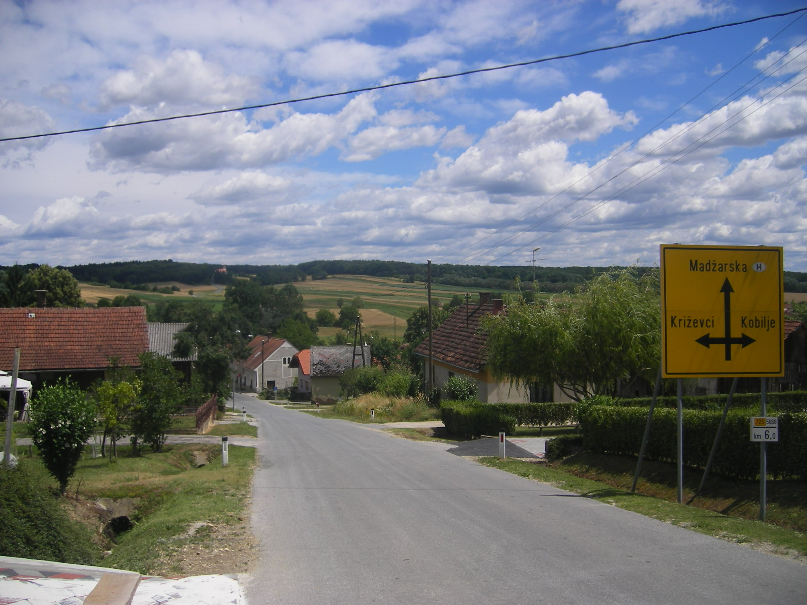 Prosenjakovci (municipality Moravske Toplice)